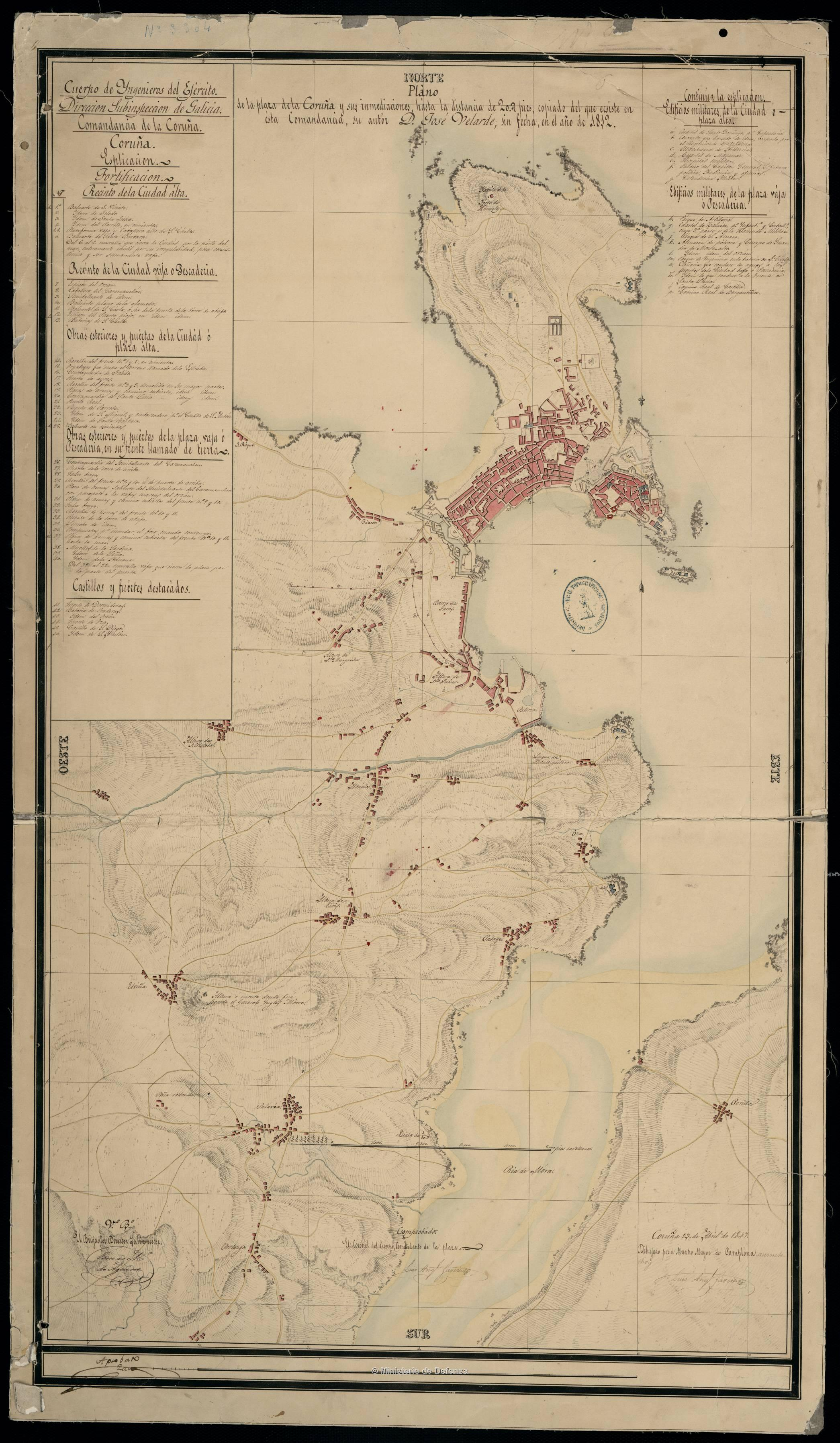 Mapa da cidade da Coruña e os seus arredores elaborado no ano 1847, baseado noutro mapa de 1812.